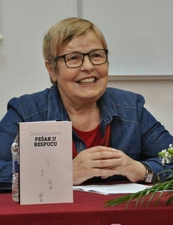 Зорка Грандов на промоцији своје аутобиографије, Пешак у беспућу.